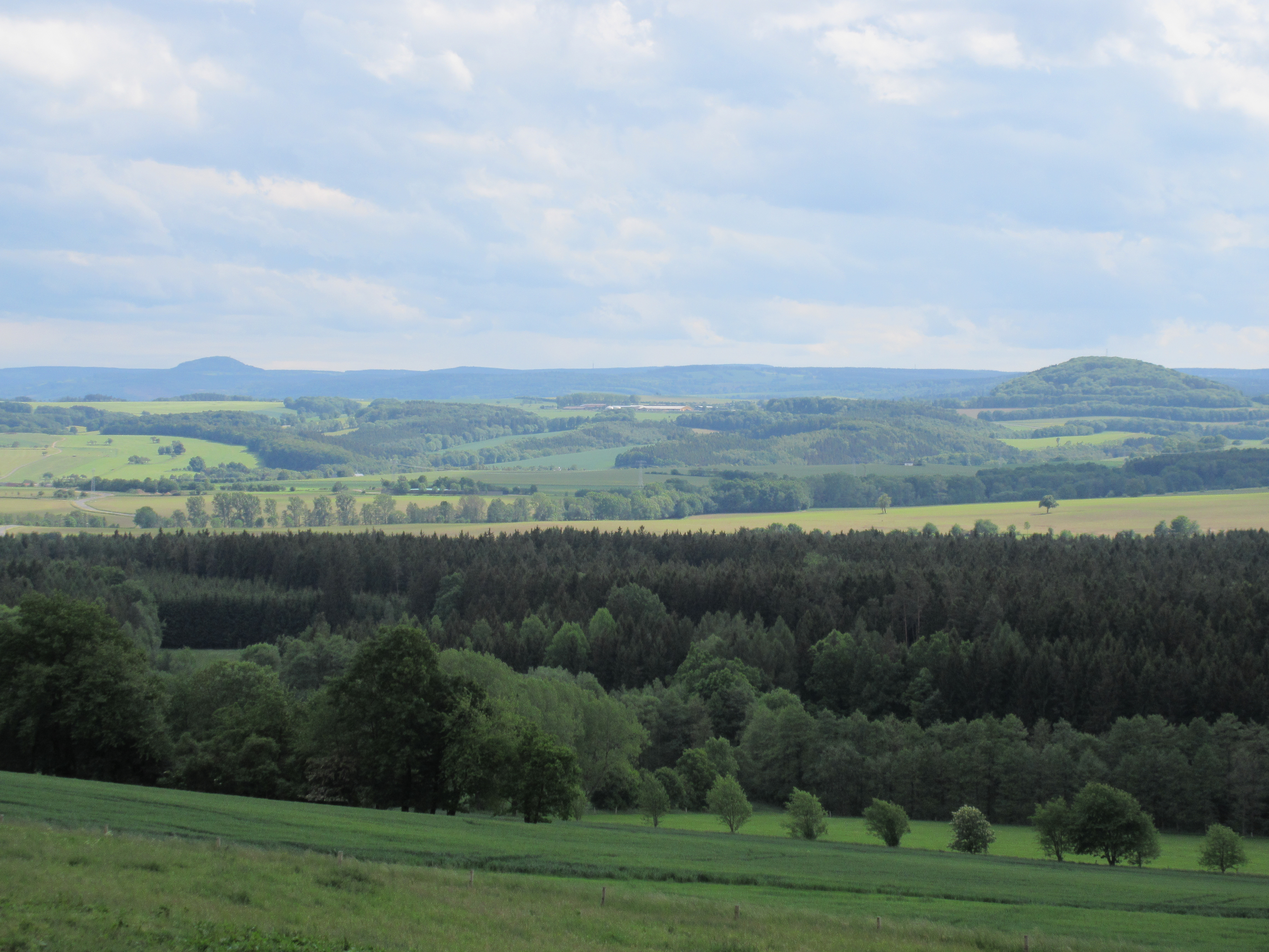 Blick vom Hermsdorfer Berg über die Hirschbachheide auf die Osterzgebirgsflanke mit dem Luchberg (im Mittelgrund rechts) sowie am Horizont v.l.n.r. Geisingberg (markanter Kegel), Lugstein (mit Funkmast) und Kahleberg (etwas rechts der Horizontmitte)